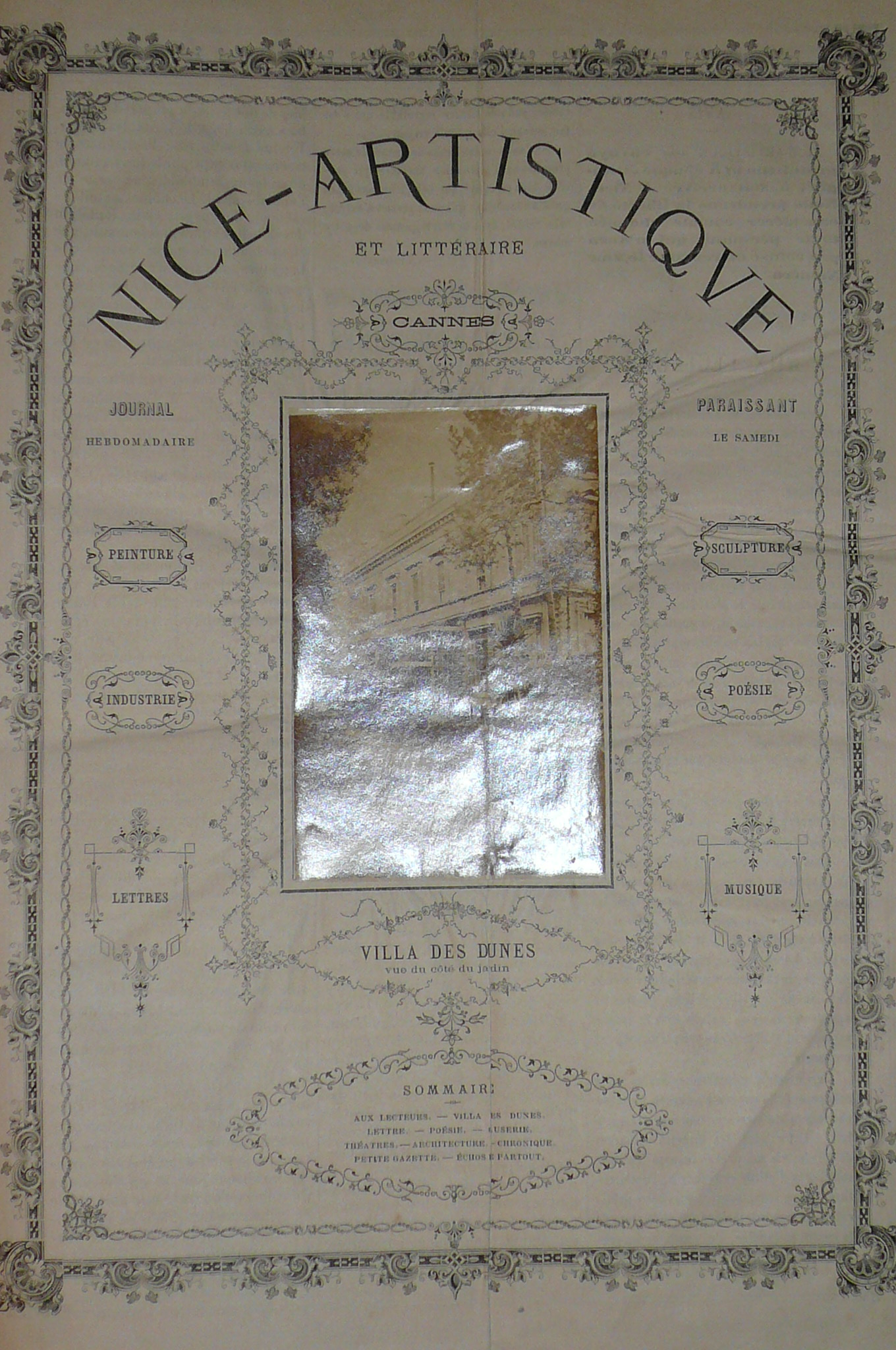 Une du journal Nice artistique et Littéraire